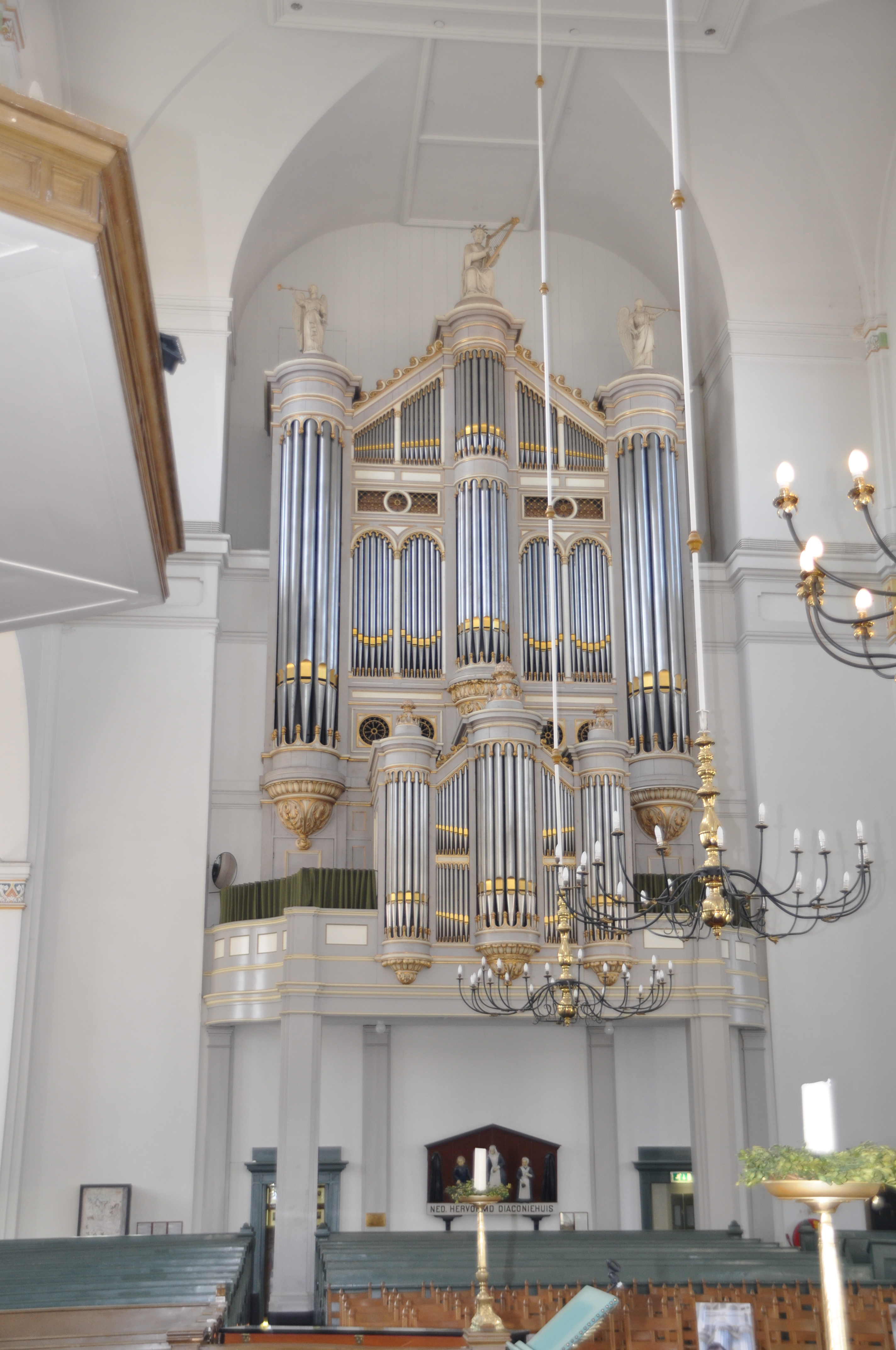 Zicht op een deel van het interieur van de Grote Kerk aan de Groenmarkt in Gorinchem